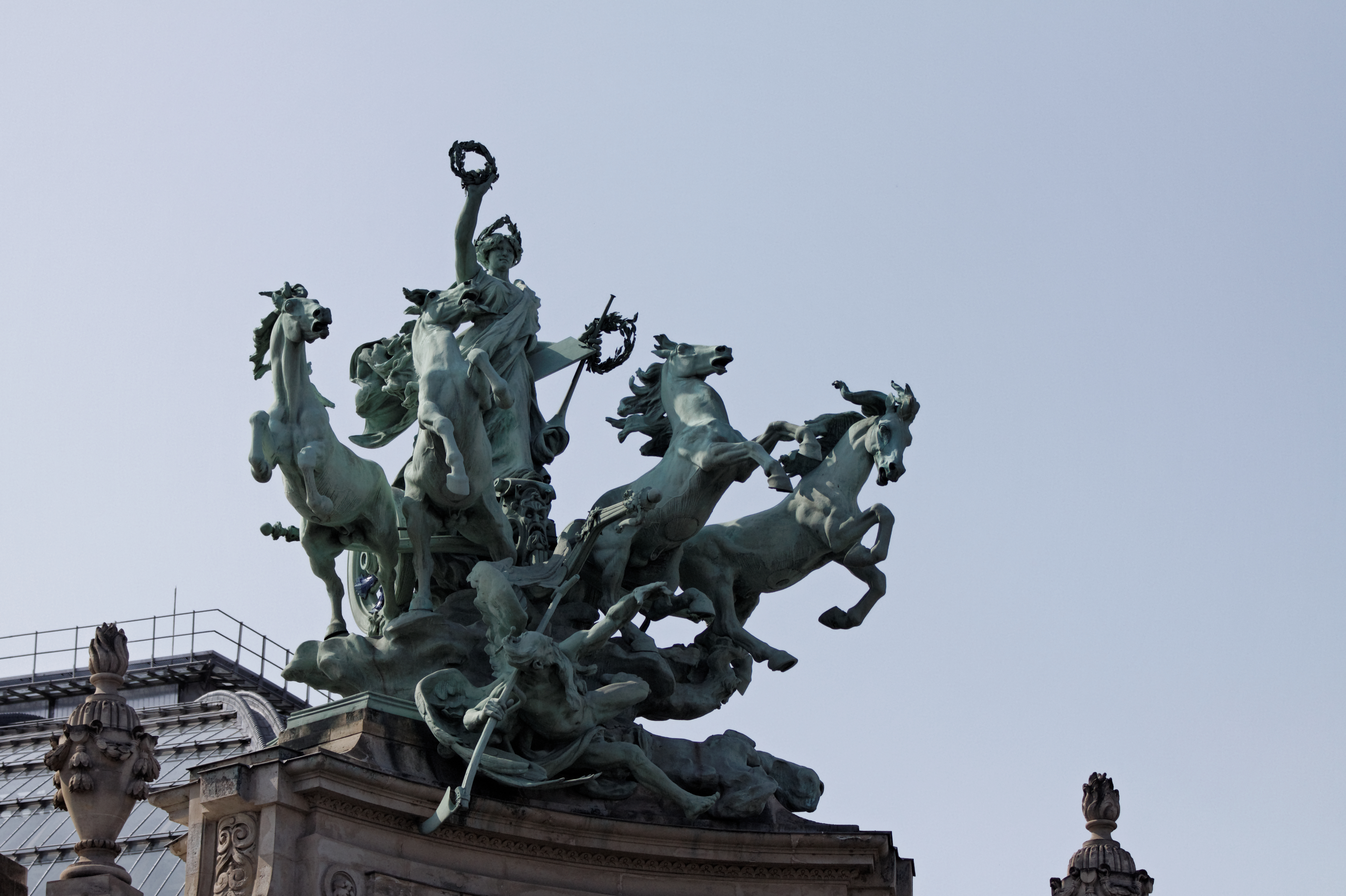 Vue de détail du Grand Palais.